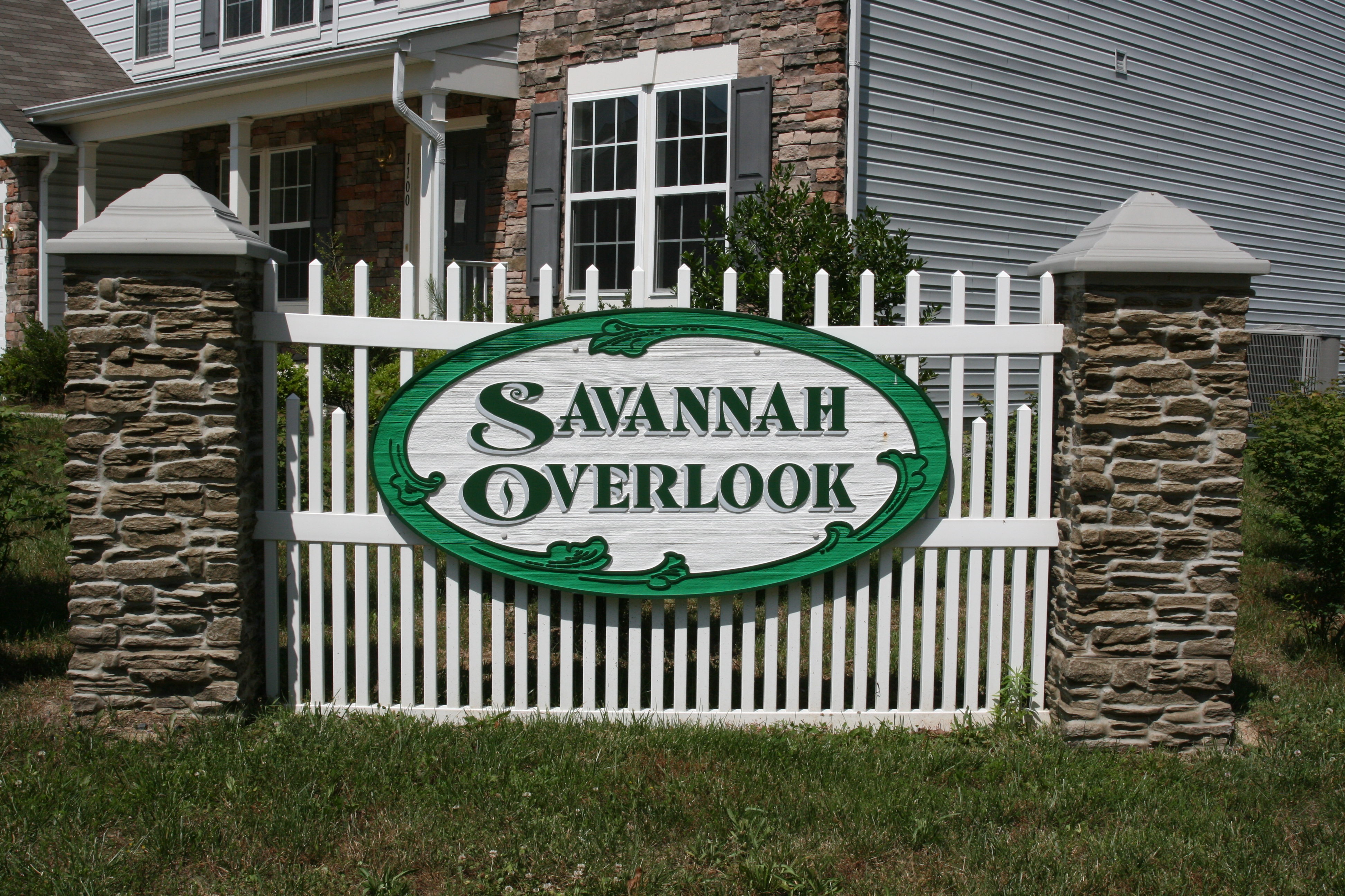 Savannah Overlook sign